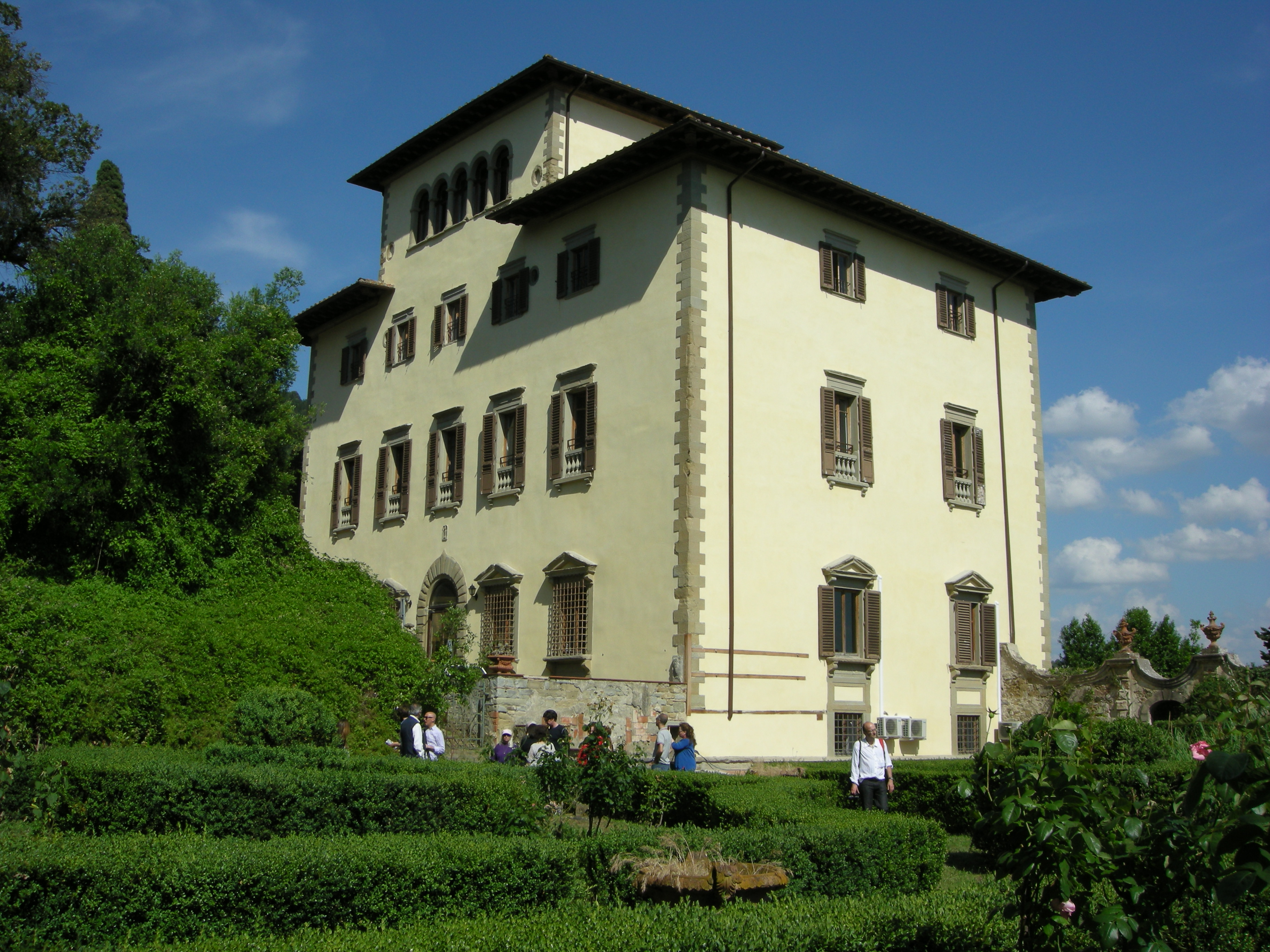 Villa La Torraccia